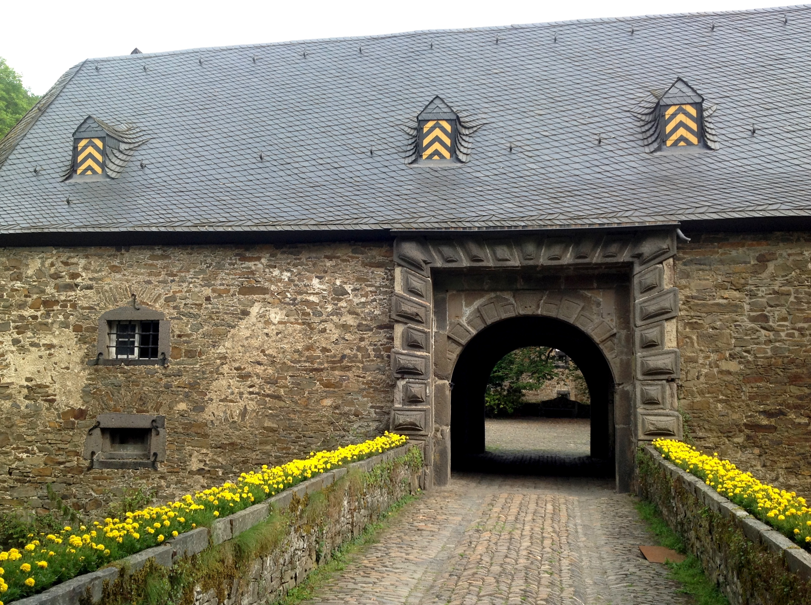 Schloss Crottorf, Landkreis Altenkirchen (Westerwald).